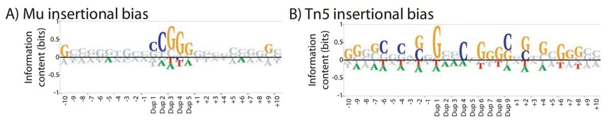 Sekų tendencingumo vizualizacijos.